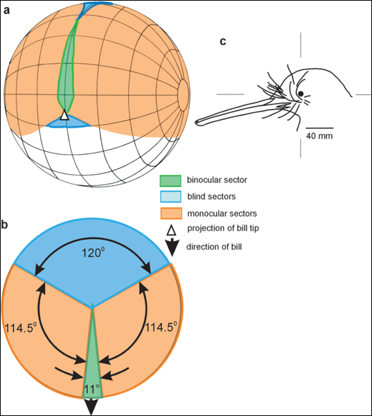 Vision binoculaire du kiwi : champ visuel selon une projection orthographique (a), selon une section horizontale (b). Vue latérale de la tête d'un kiwi (c), montrant des yeux minuscules qui traduisent une recherche de la nourriture, à l'aveugle, en se fiant essentiellement à l'odorat.